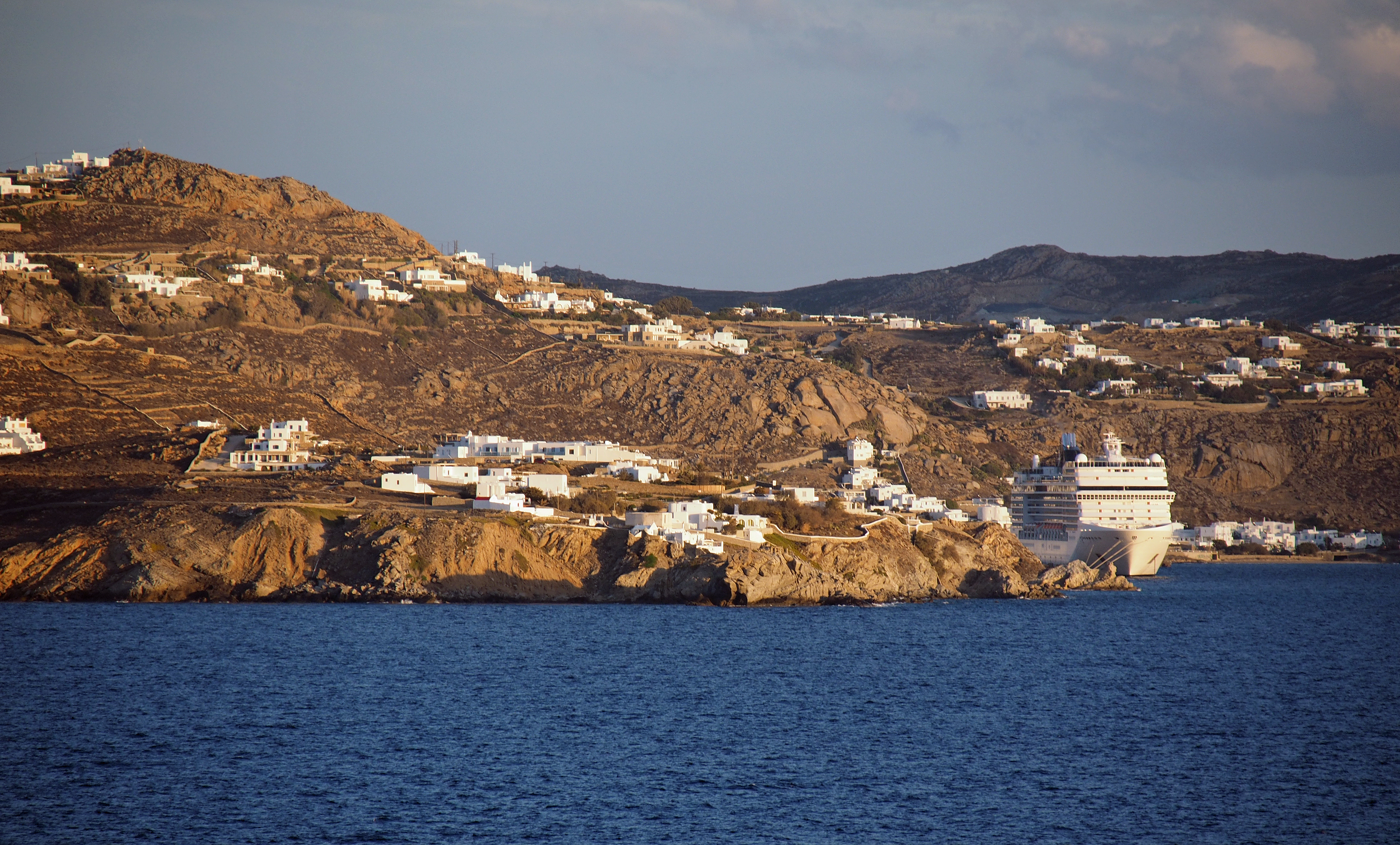 Kreuzfahrtschiff im Hafen von Mykonos, Greece